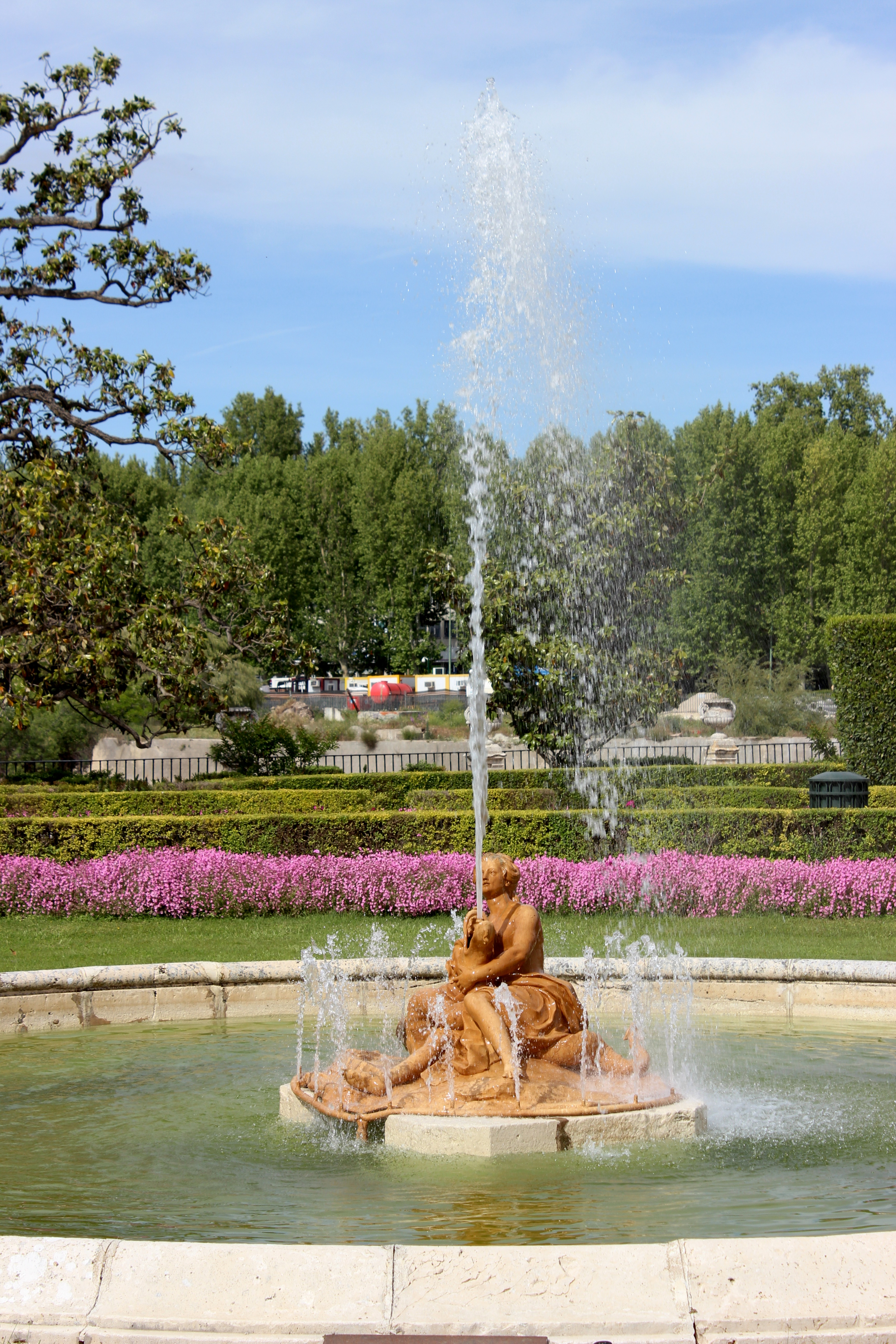 Fuentes de las Nereidas. Palacio de Aranjuez.